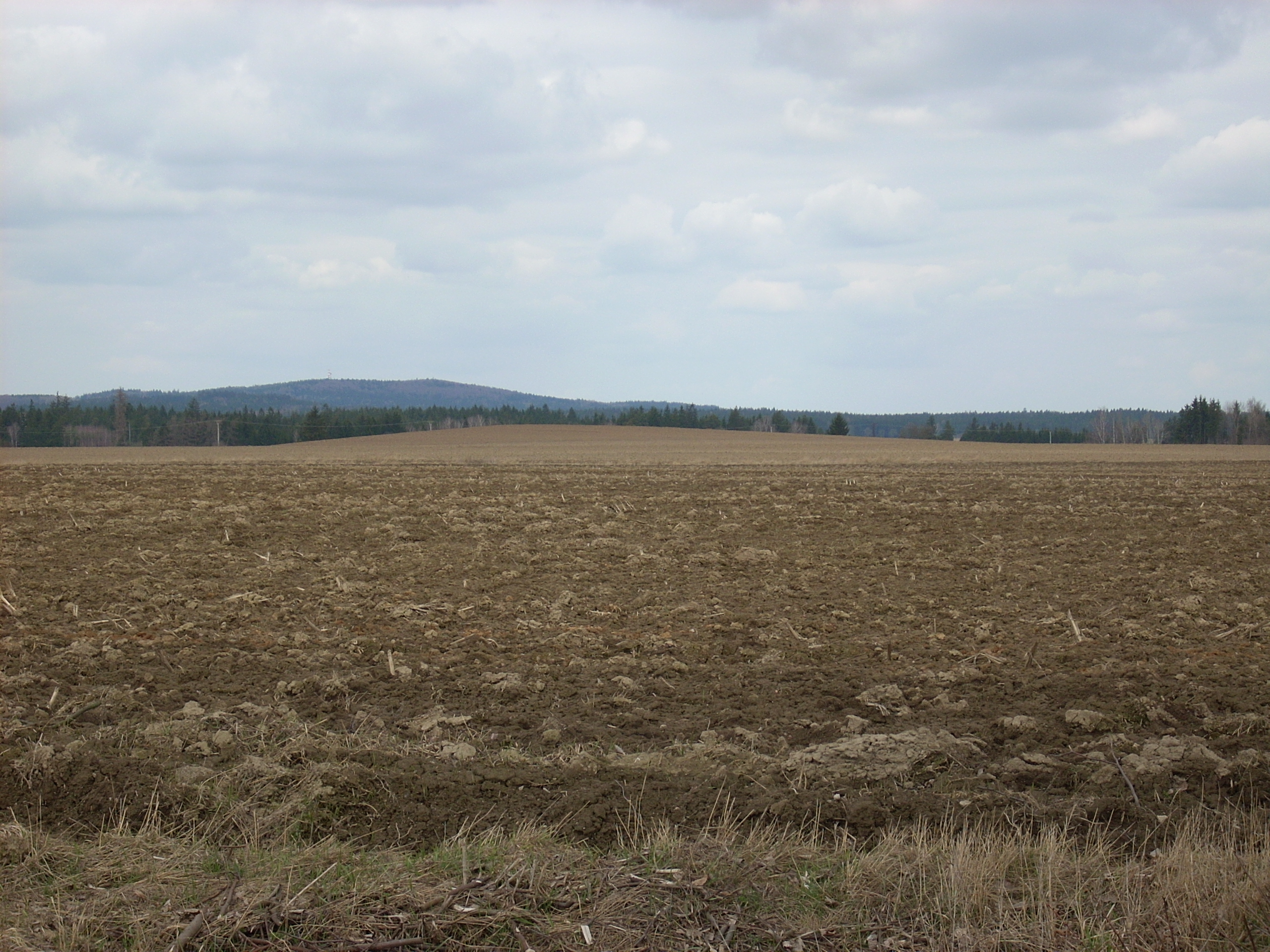 Zahradníkův kopec, Střítež, okres Jihlava